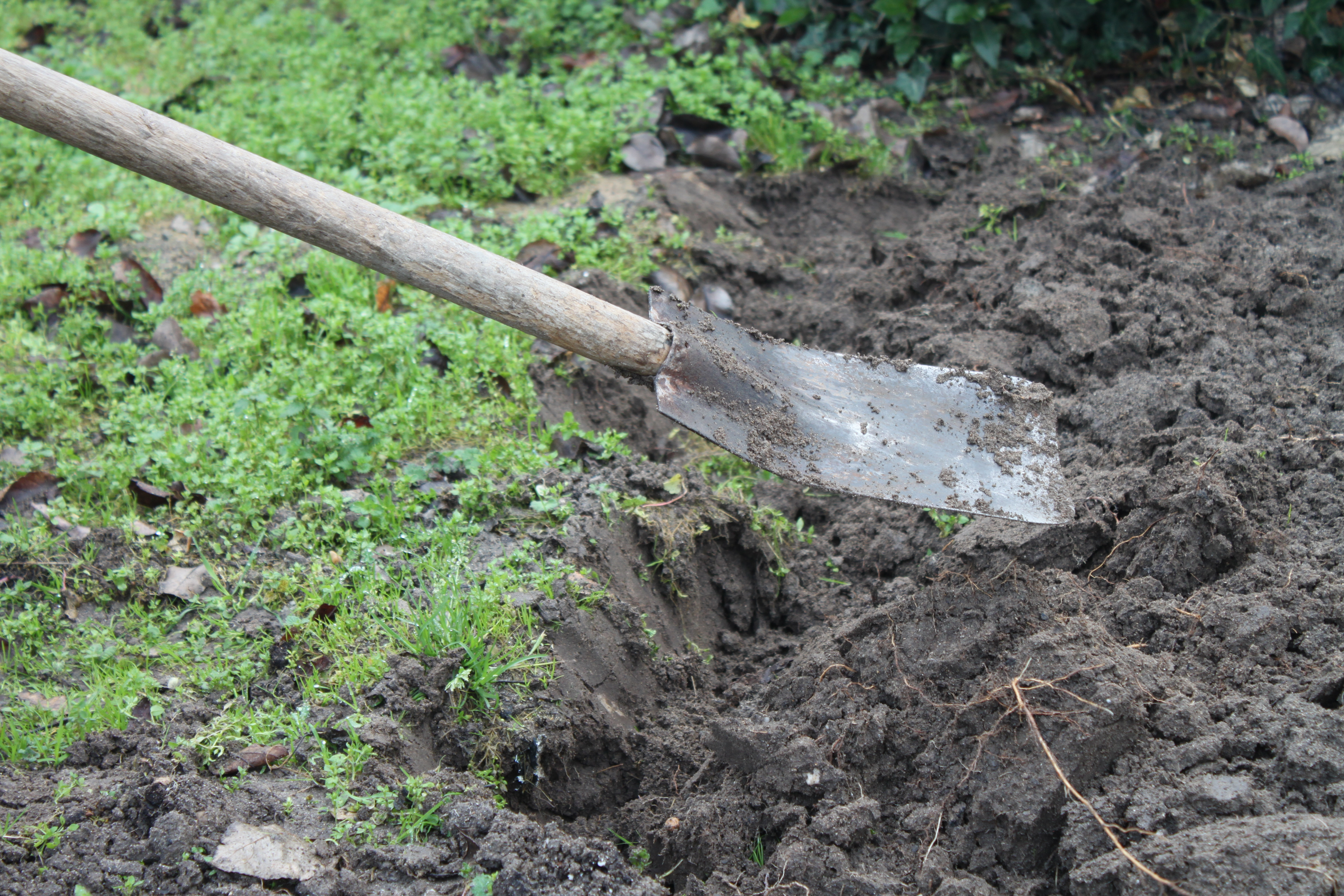 Une Fraïe retournant la terre dans un potager Montois